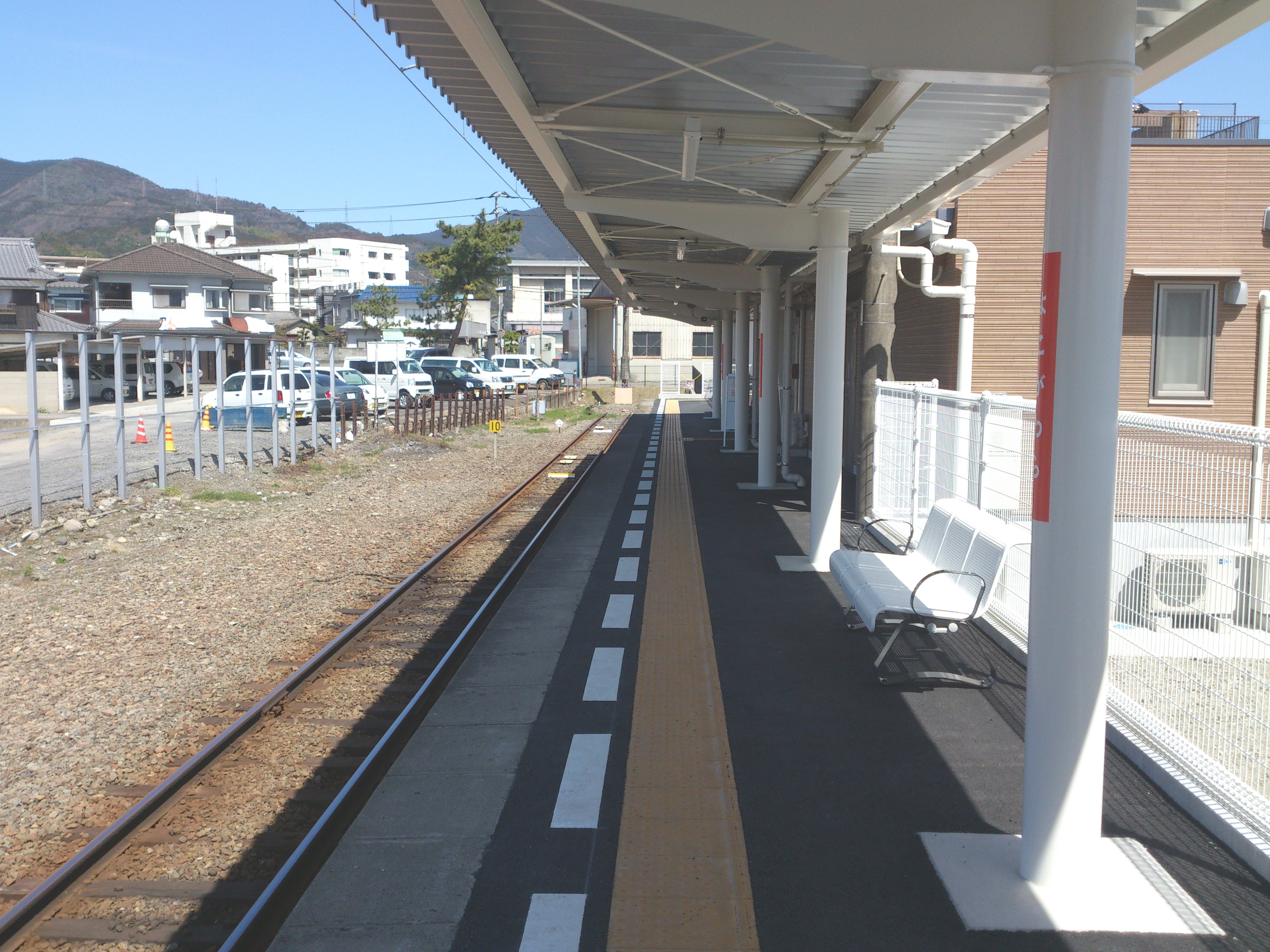 伊予鉄道、横河原駅のホームです。